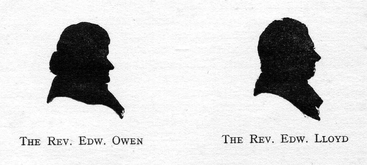 Silhouettes of Rev. E. Owen and Rev. E. Lloyd